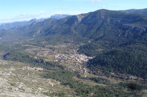 Arroyo Frío